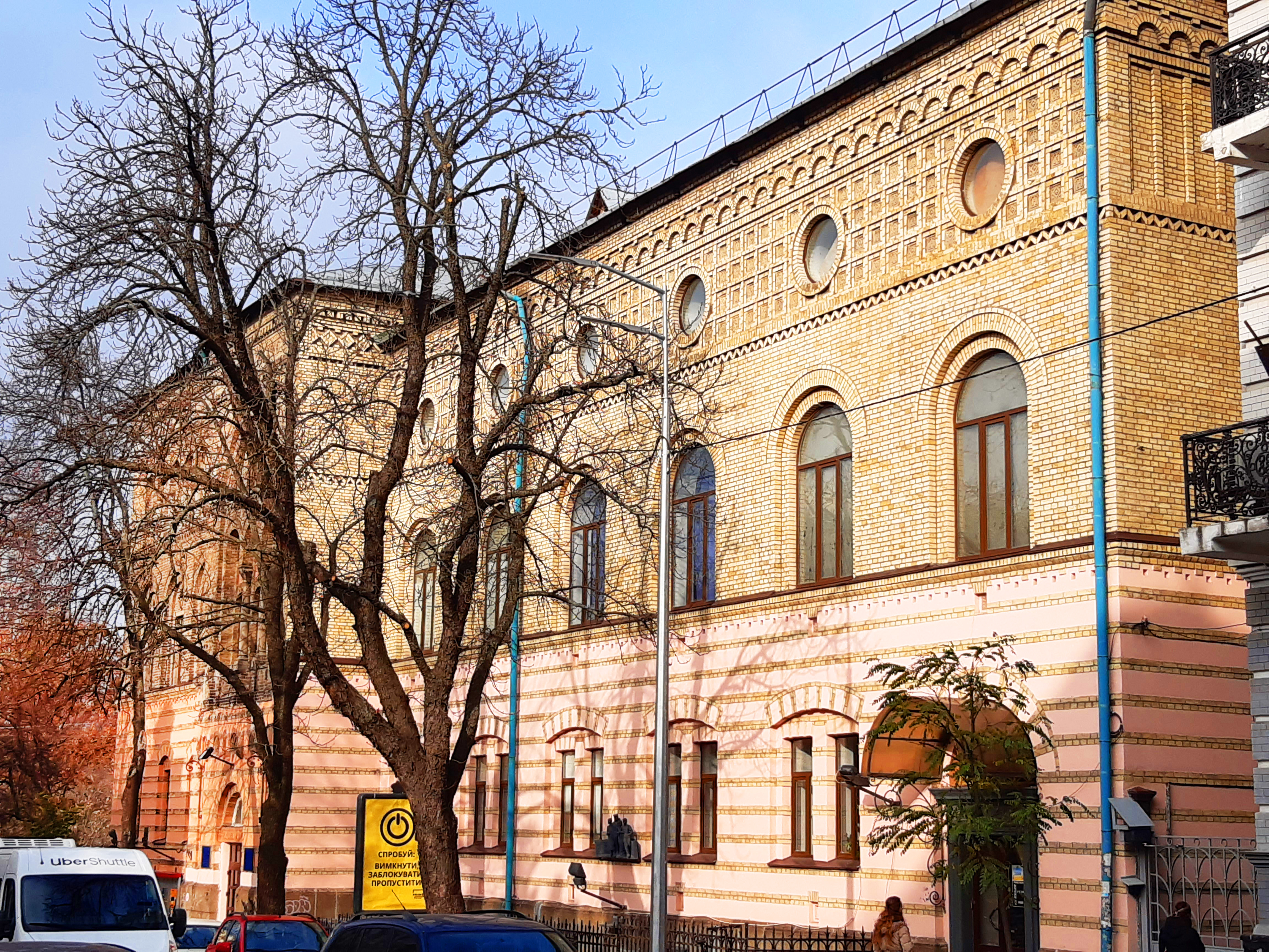 Будинок колишнього Міського парафіяльного училища імені Терещенка, Київ, вул. Ярославів Вал, 40